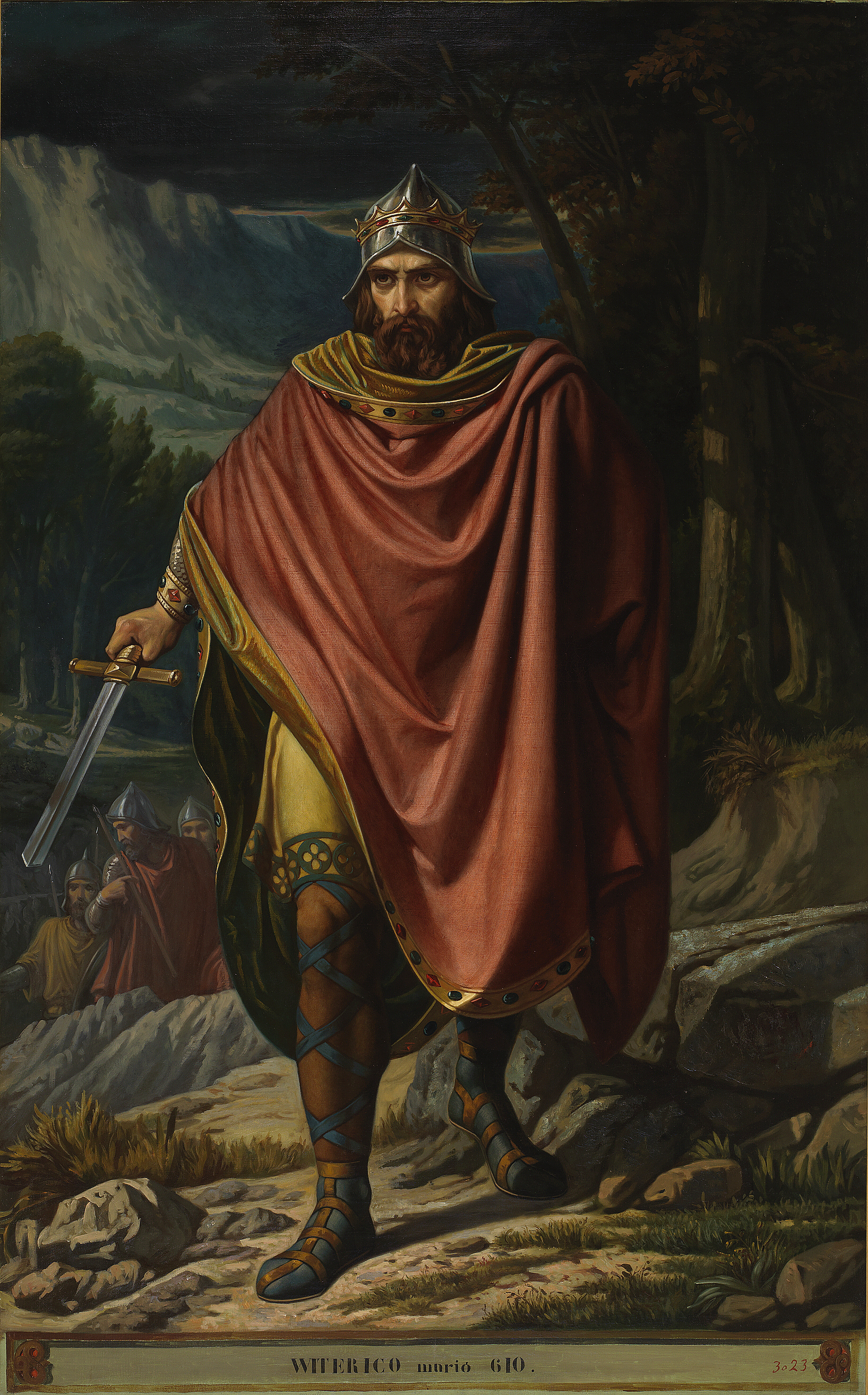 El lienzo representa a Witerico († 610), rey de los visigodos entre los años 603 y 610. Sucedió al rey Liuva II y fue sucedido a su vez por el rey Gundemaro. Apoyado por los arrianos, encabezó una conspiración contra su antecessor, el rey Liuva II, a quien depuso y asesinó.